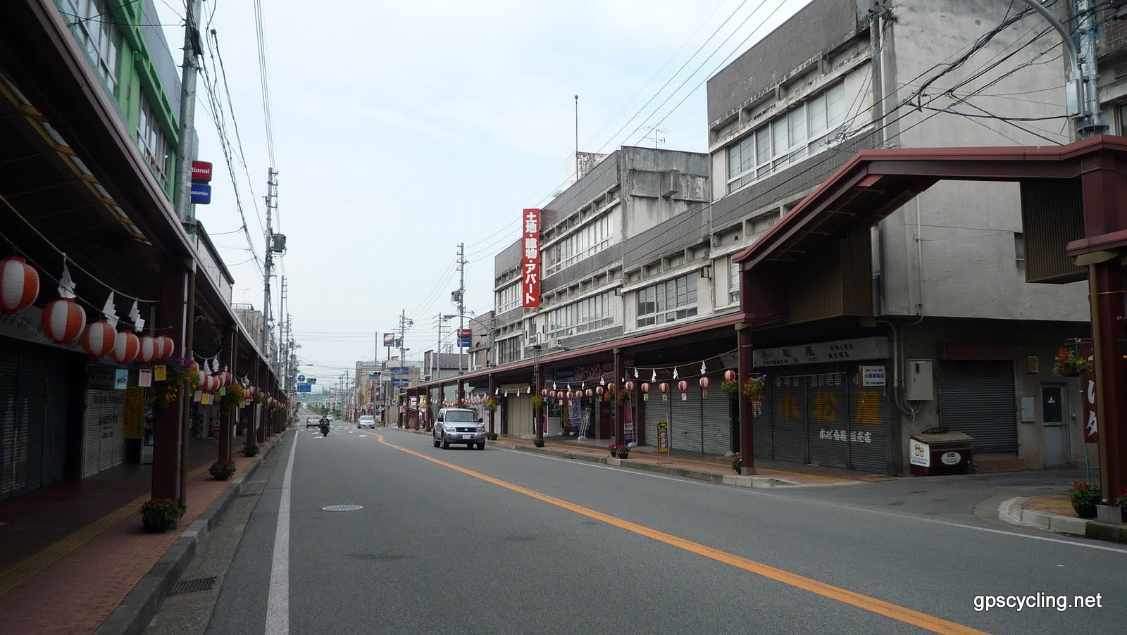 岩村田